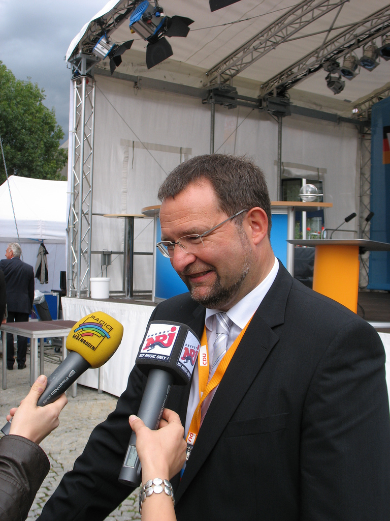 Gert Hager, Oberbürgermeister der Stadt Pforzheim, im Radio-Interview CDU-Wahlkampfveranstaltung in Pforzheim 2009